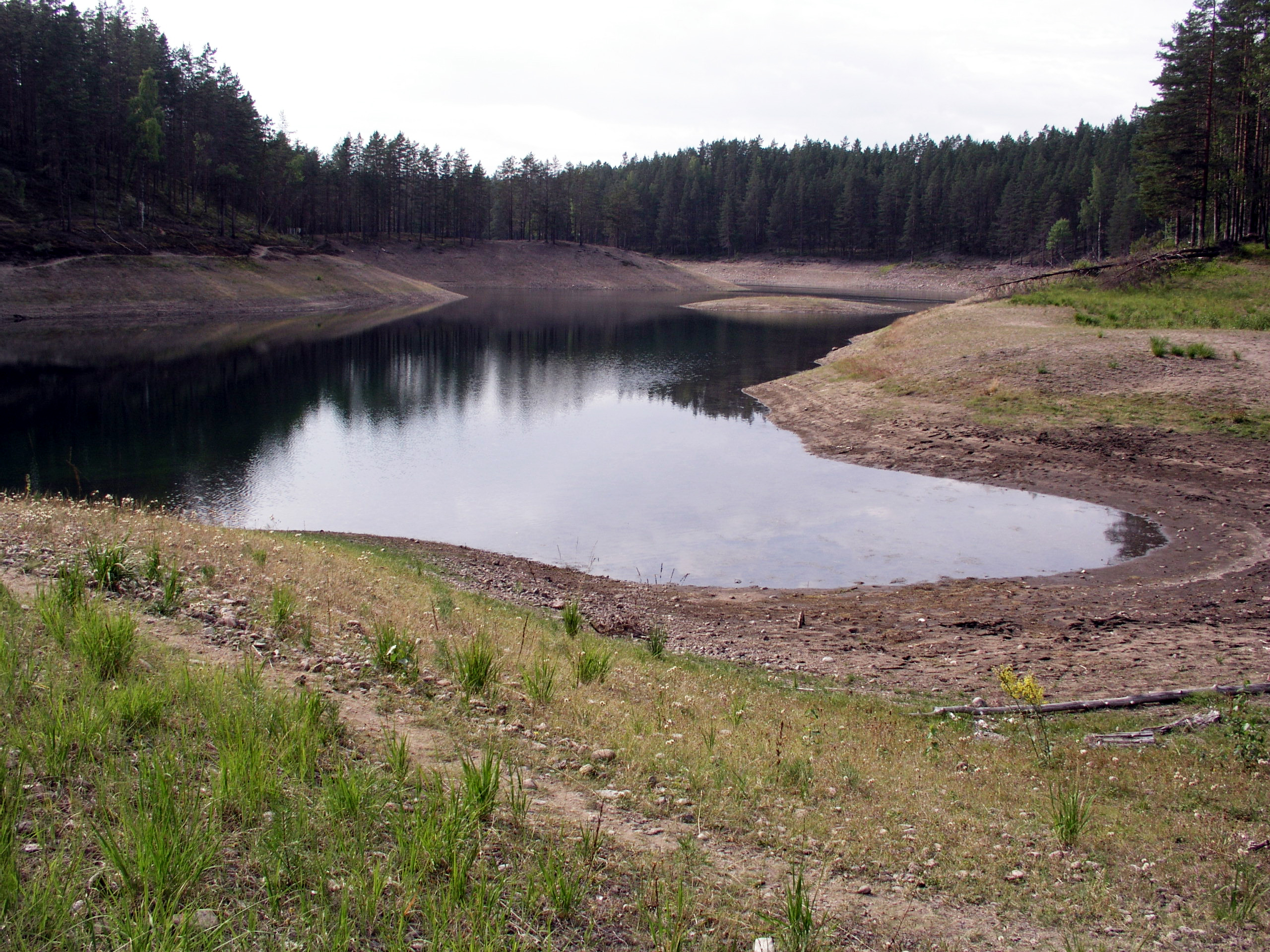 Gröntjärn, cold spring well (lake) of water, Ljusdal kommun, Gröntjärn nature reserve